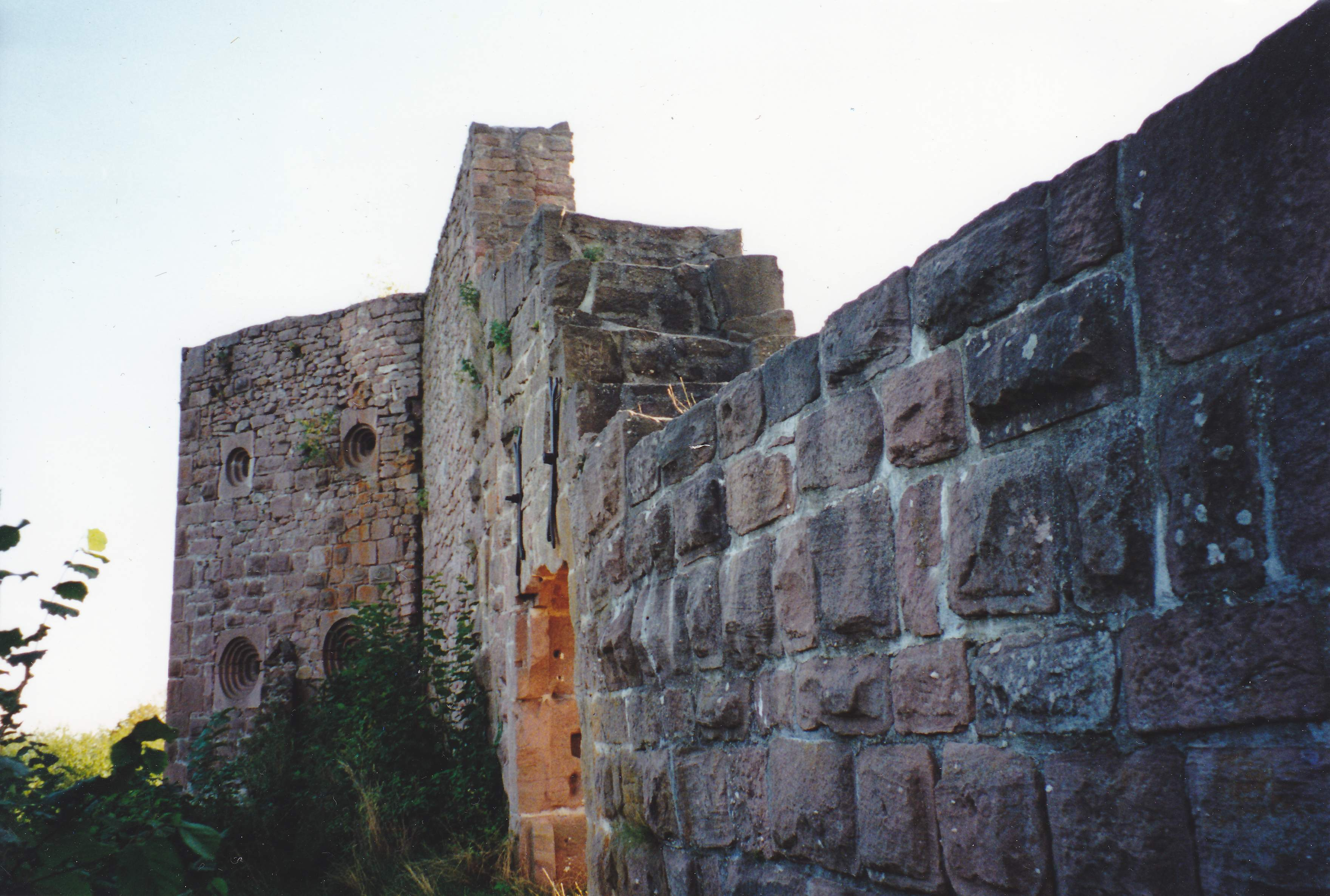 Château du Frankenbourg (714 m) à Neubois (Bas-Rhin, France).